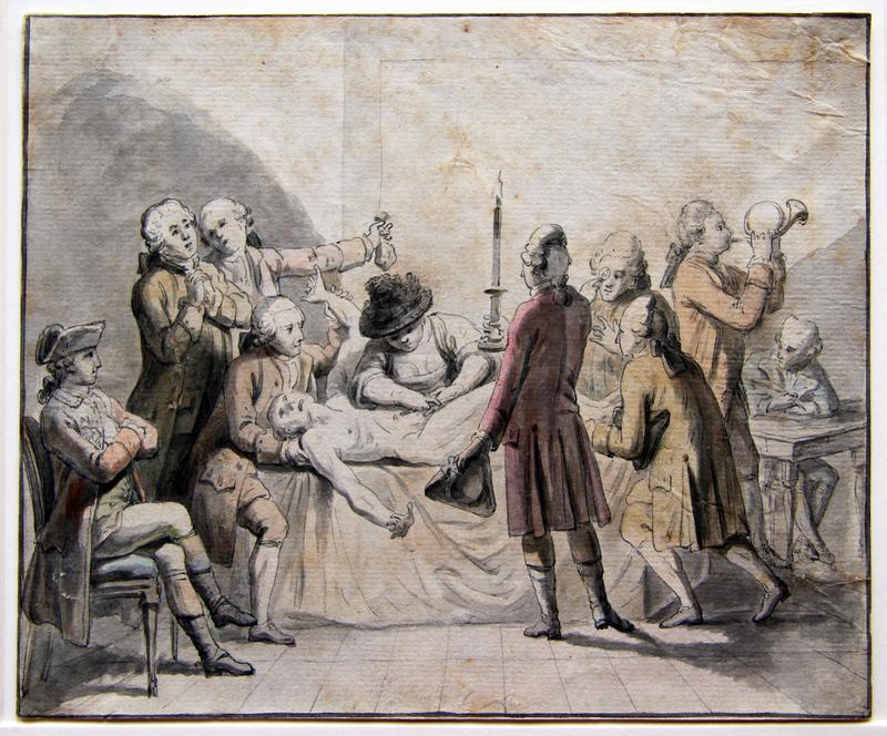 Karikatur Schriftstellerin Charlotte Biehl kastriert Holberg